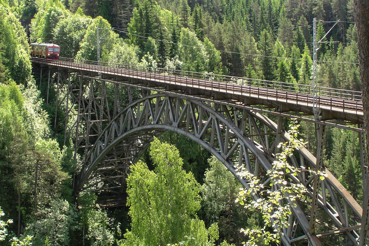 Bru over Hjuksa med Y1 1300.